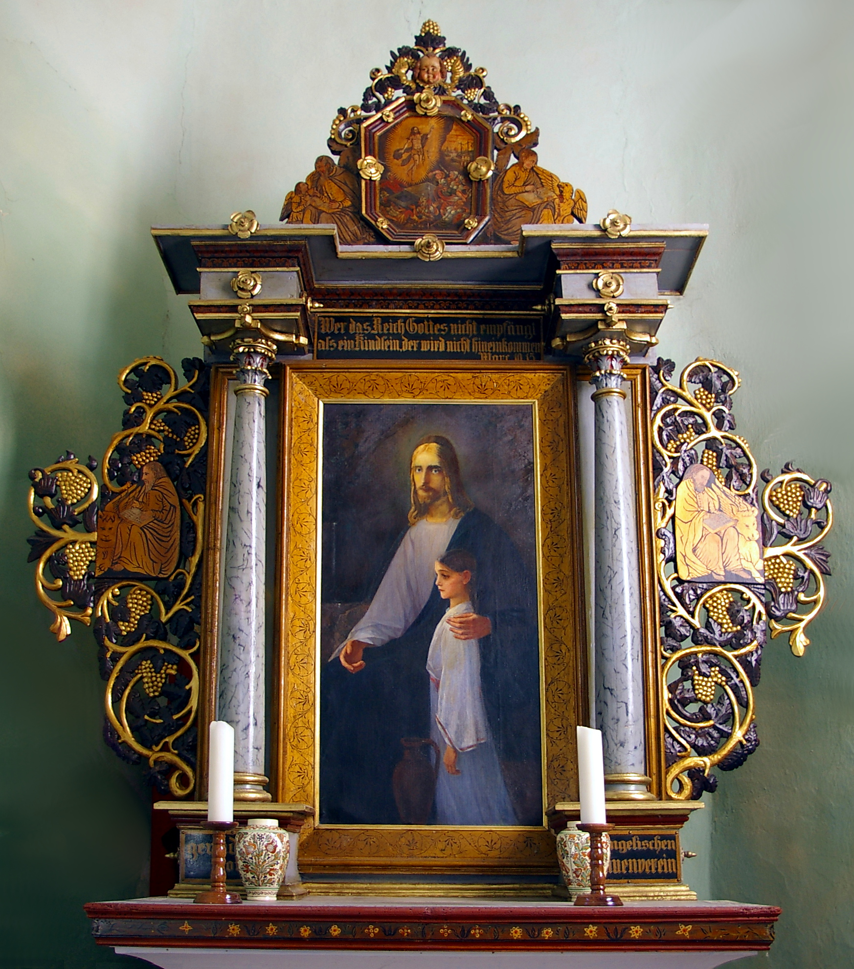 Altar von 1807 in Seligstadt, Hauptbild von Fritz Schullerus aus 1892